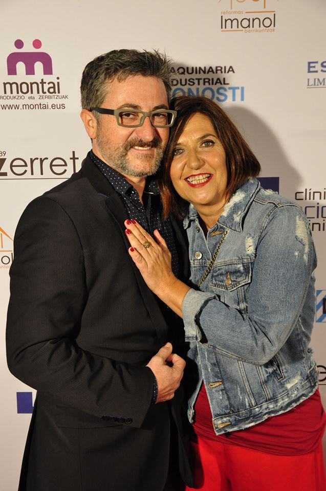 Entrega de premios Ulialde 2016